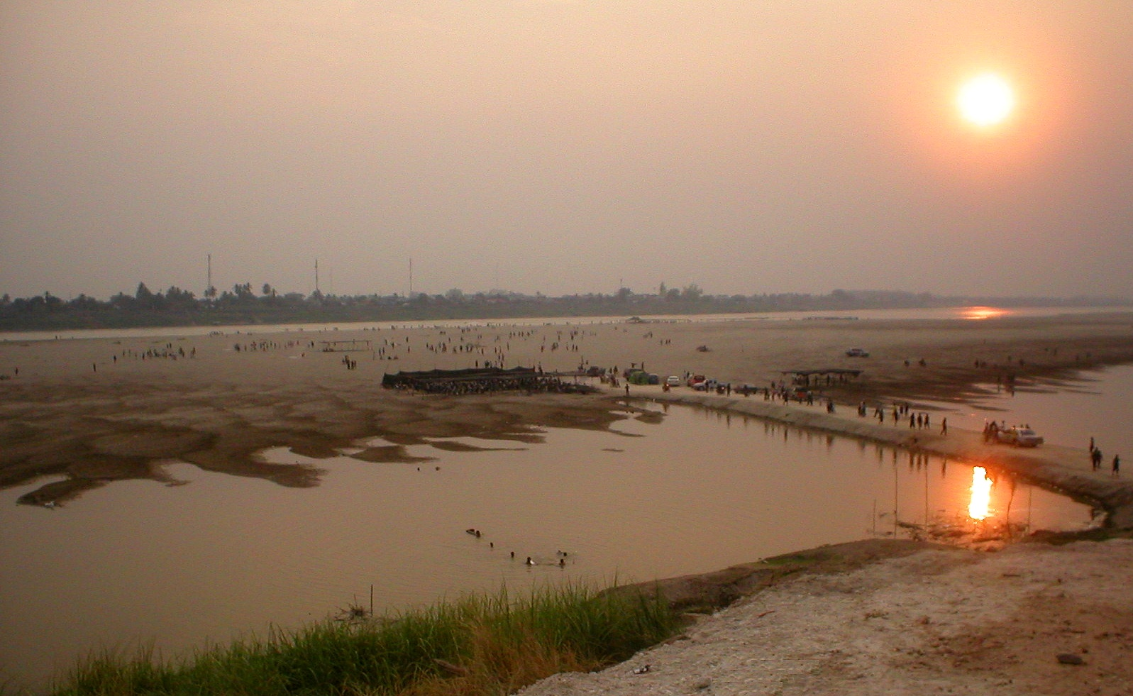 Le Mékong lors des basses-eaux à Vientiane (Laos) en avril 2006 (coucher de soleil)- La population descends dans le lit du fleuve (qui coule au loin) pour s'amuser.